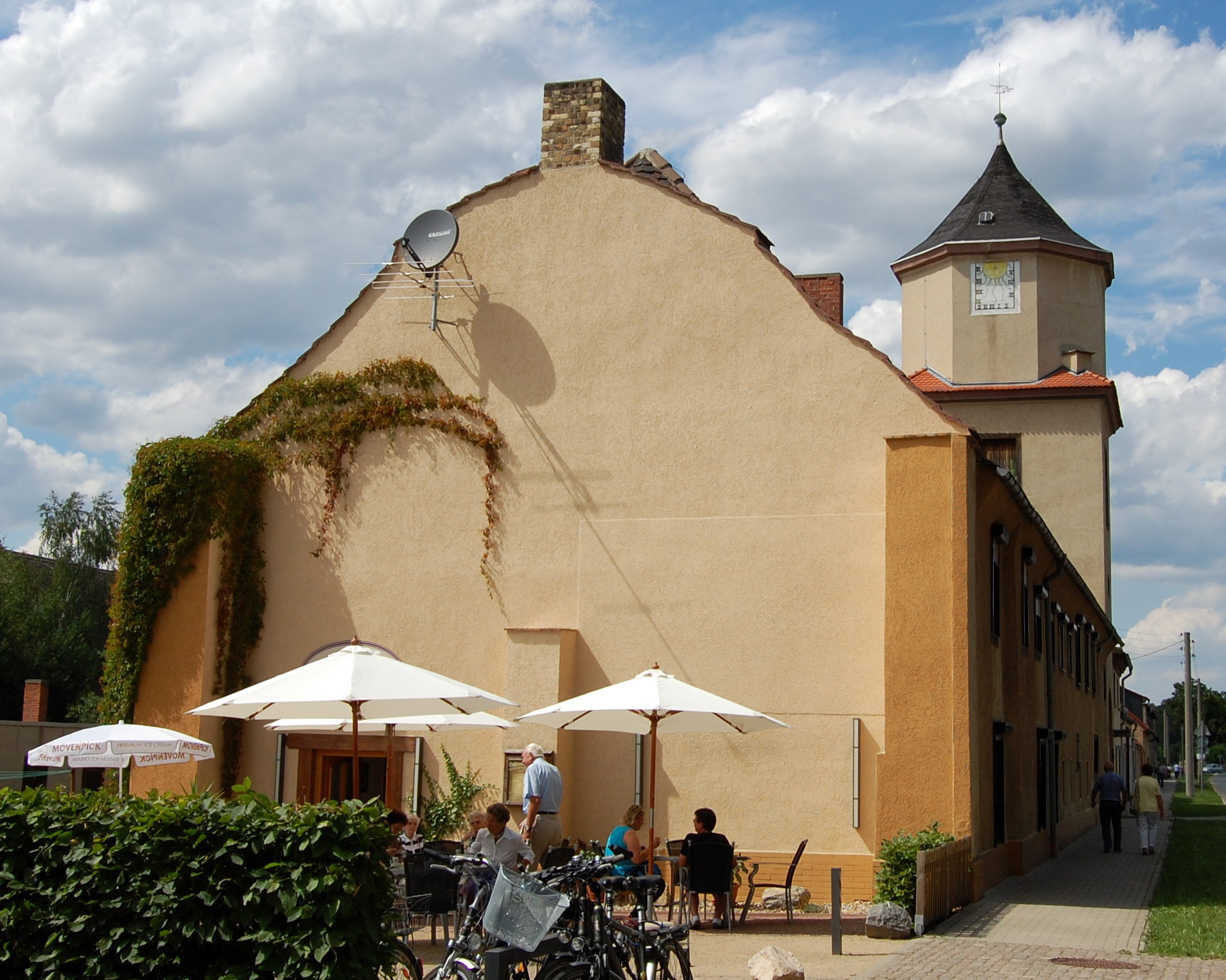 Schloss in Alt Jeßnitz